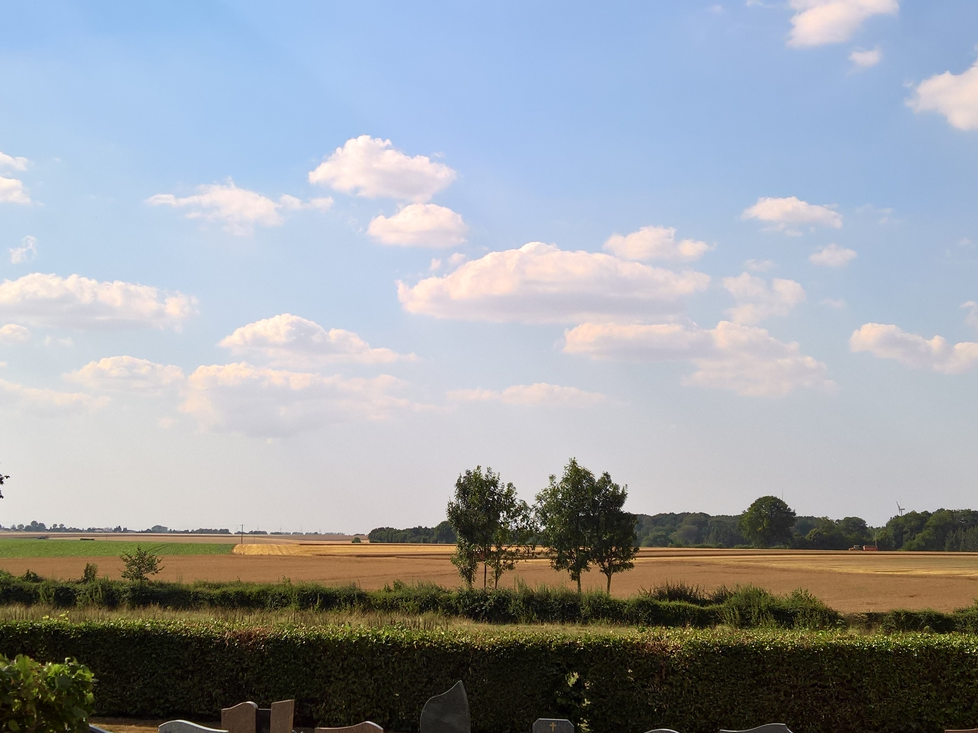 Le Hamel (Oise) - Les champs à la moisson